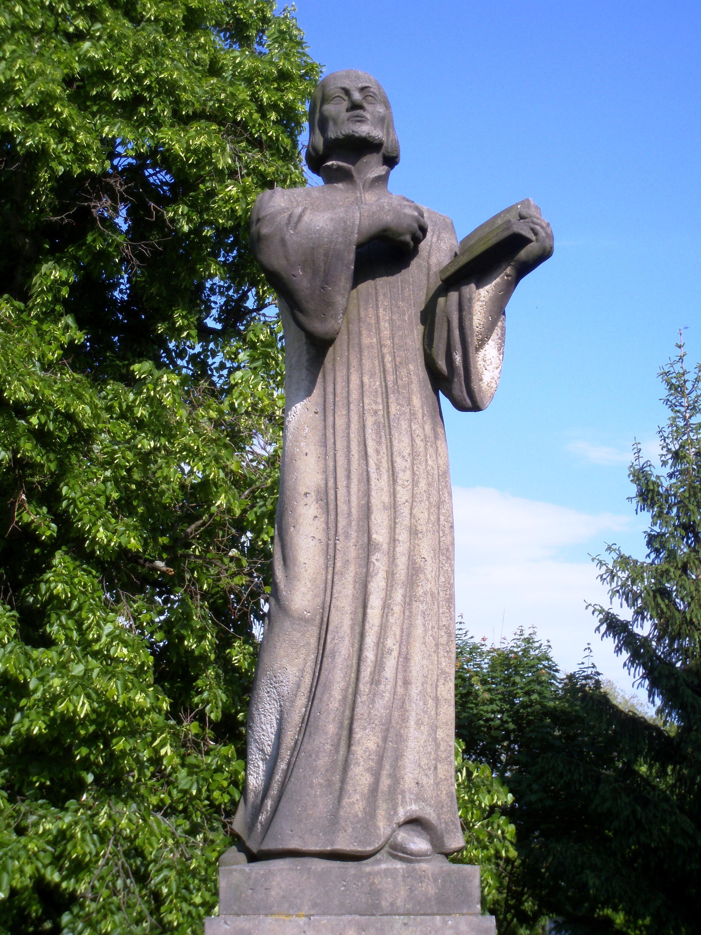 Pomník J. Husa v Plotištích (Hradec Králové)